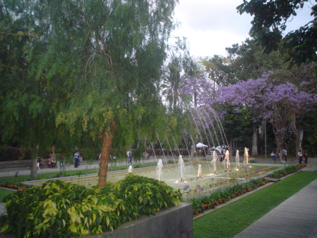 ^Paseo del Parque Garcia Sanabria.